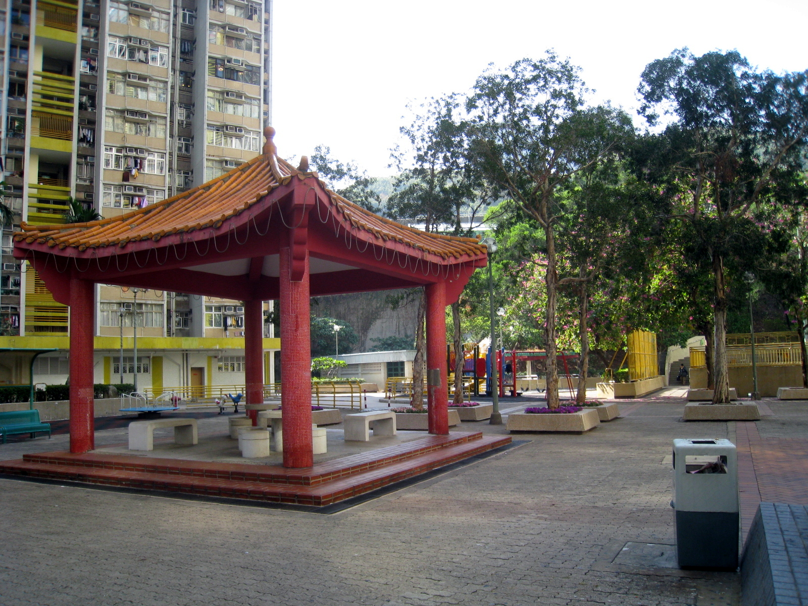 Cheung On Estate Garden Pavilion